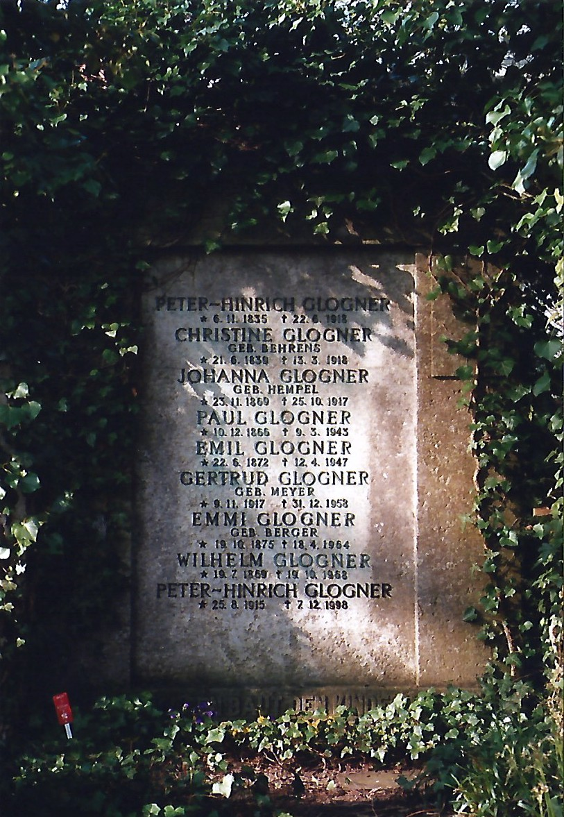 Das Glogner’sche Familiengrab auf dem Burgtorfriedhof in Lübeck